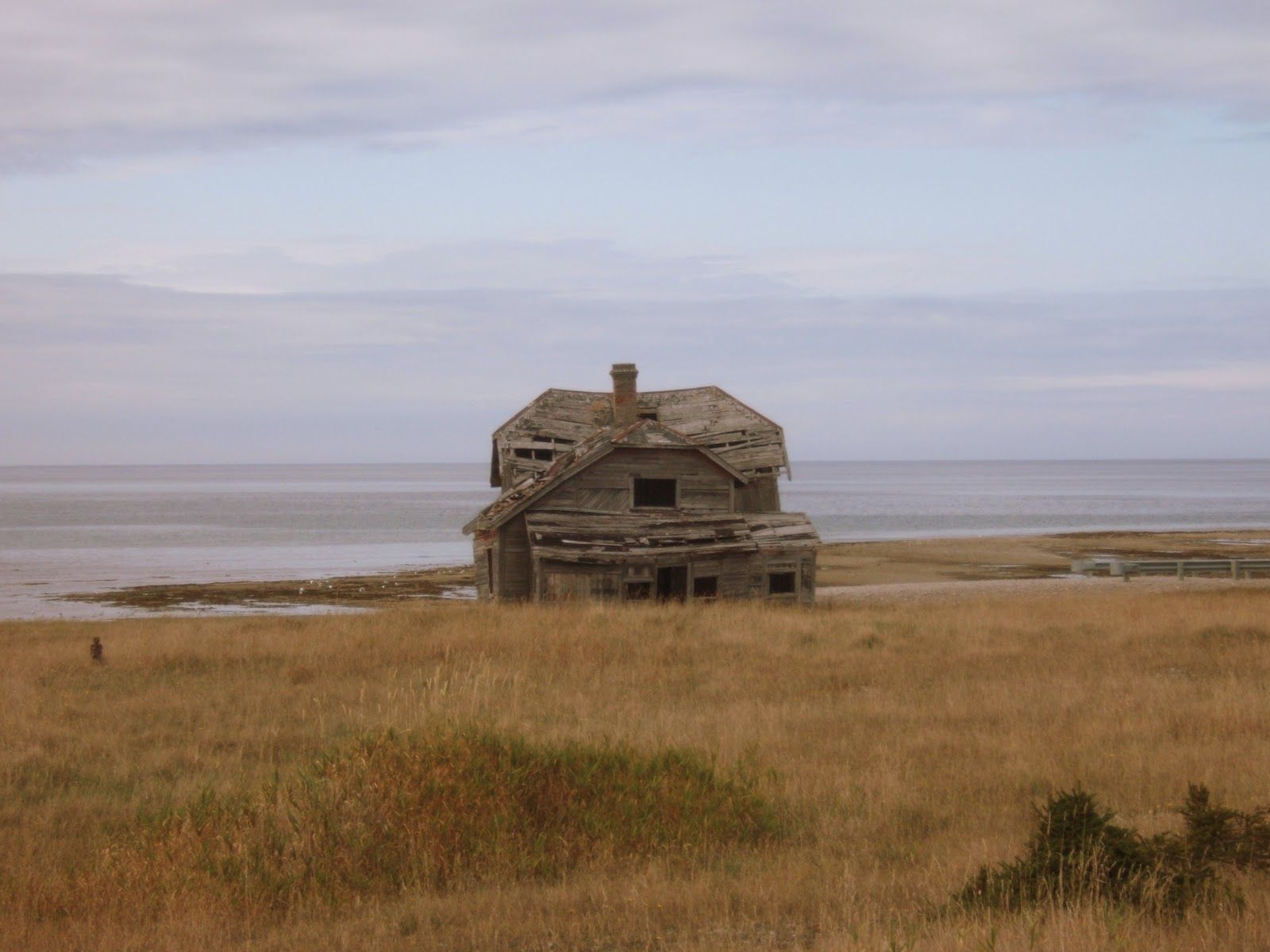 Village fantome de Baie-Sainte-Claire, au Québec.